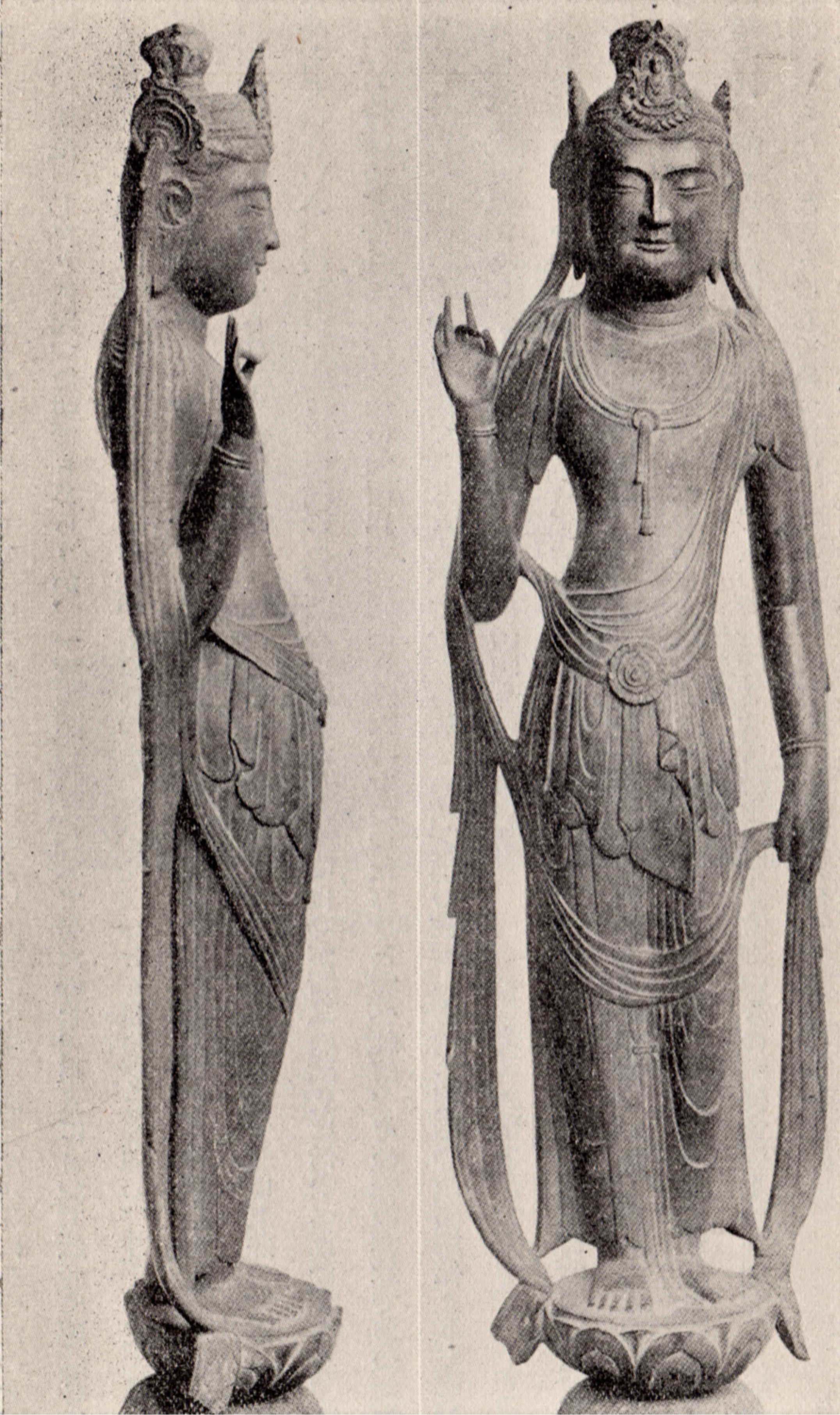 高さ2尺9寸。白鳳期におそらく蠟型で造られた銅像。昭和7年刊行の香取秀真『日本金工史』より。